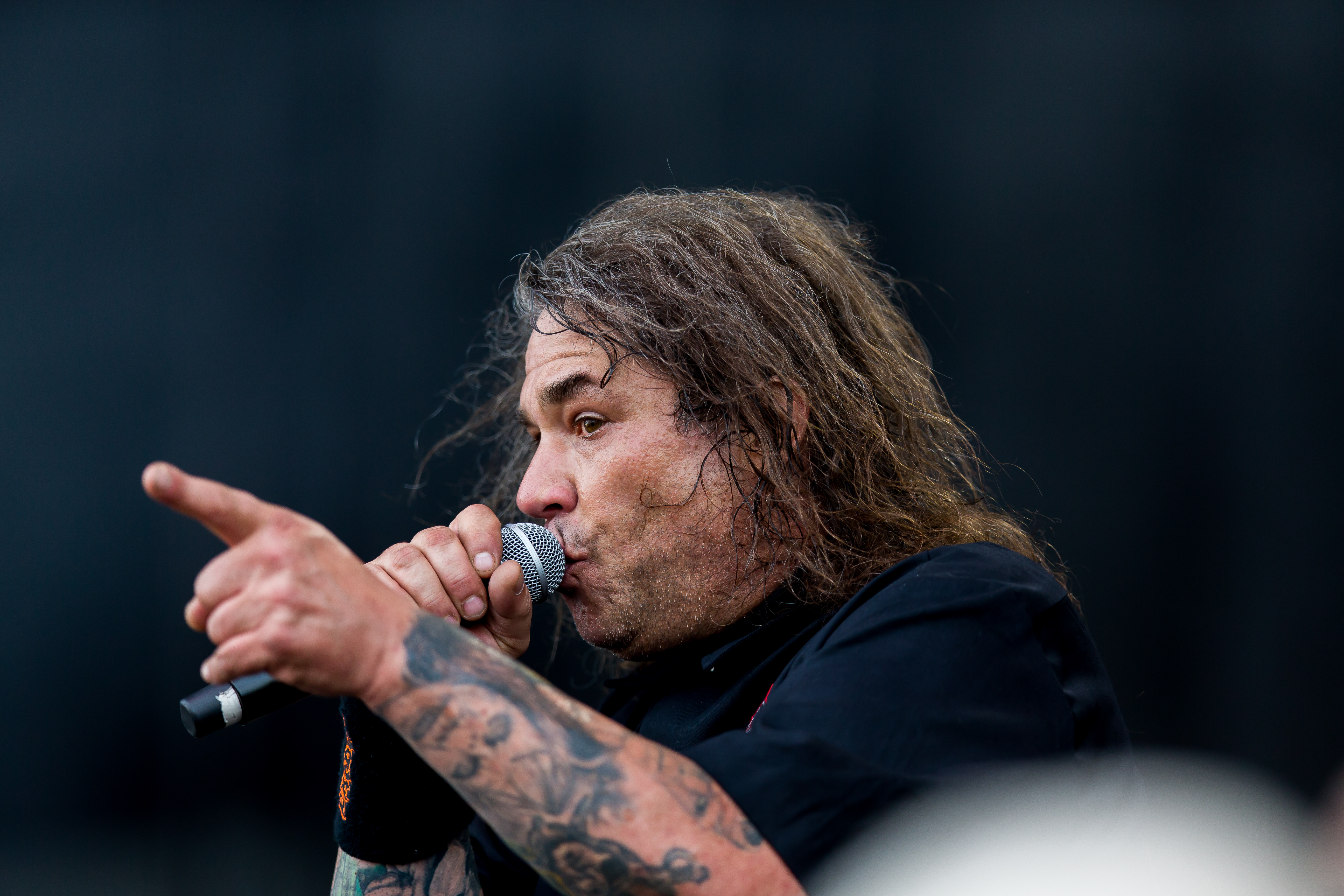 Exodus during Summer Breeze 2016 at , Dinkelsbühl, Bayern, Germany on 2016-08-18, Photo: Sven Mandel